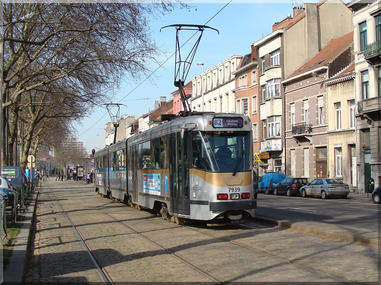 Motrice 7939 sur le Boulevard de l'Abattoir en direction de Berchem Station